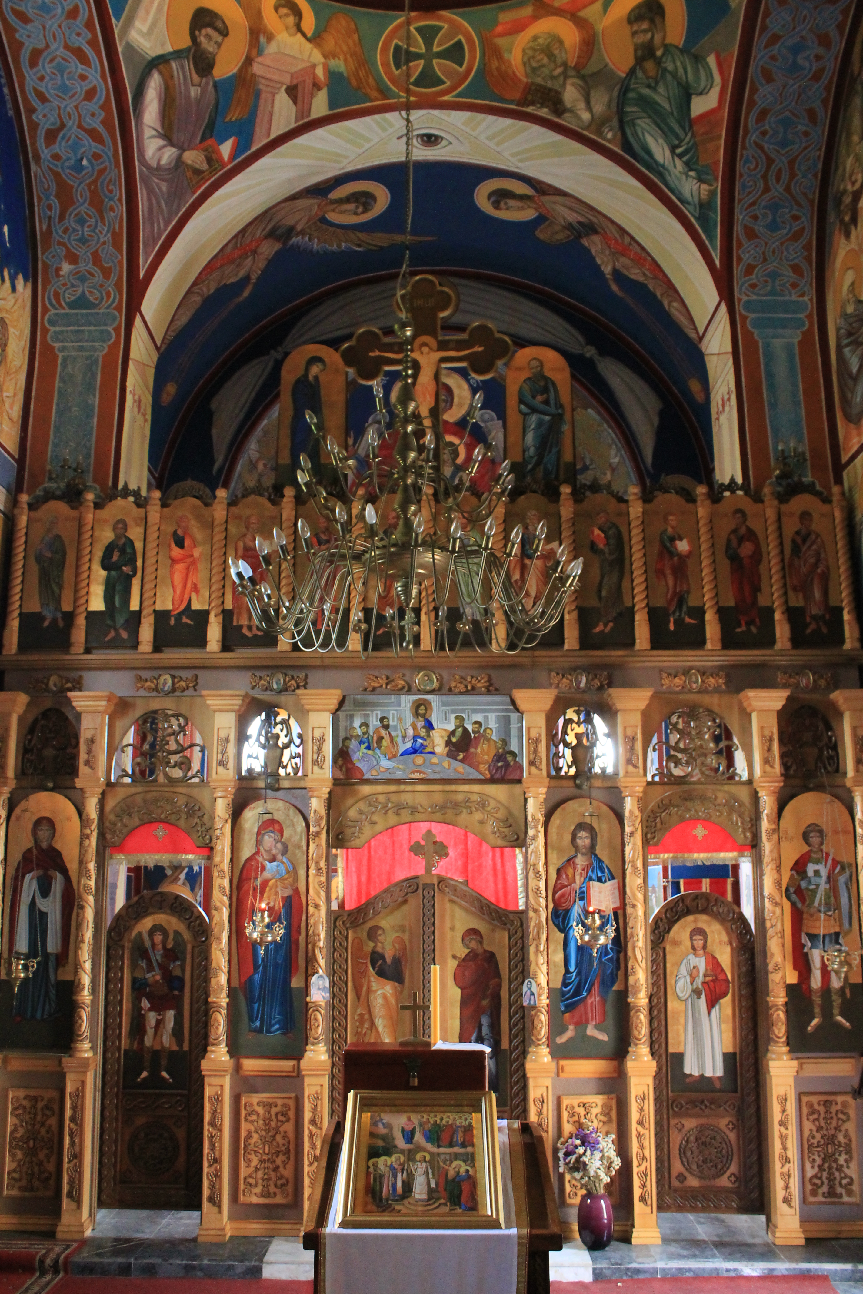 Saborna crkva Sv. arhangela Mihaila i Gavrila